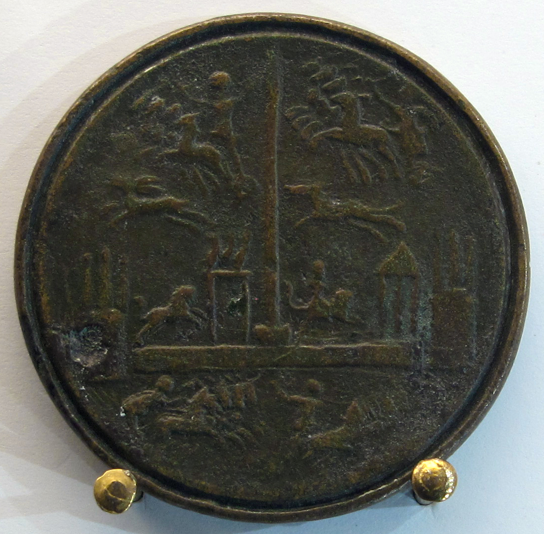 Medaglione contorniato di nerone con spina del circo massimo, quadrighe e lepre inseguita da un cane